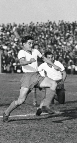 Emilio Baldonedo Futbolista del Club Atlético Huracán.